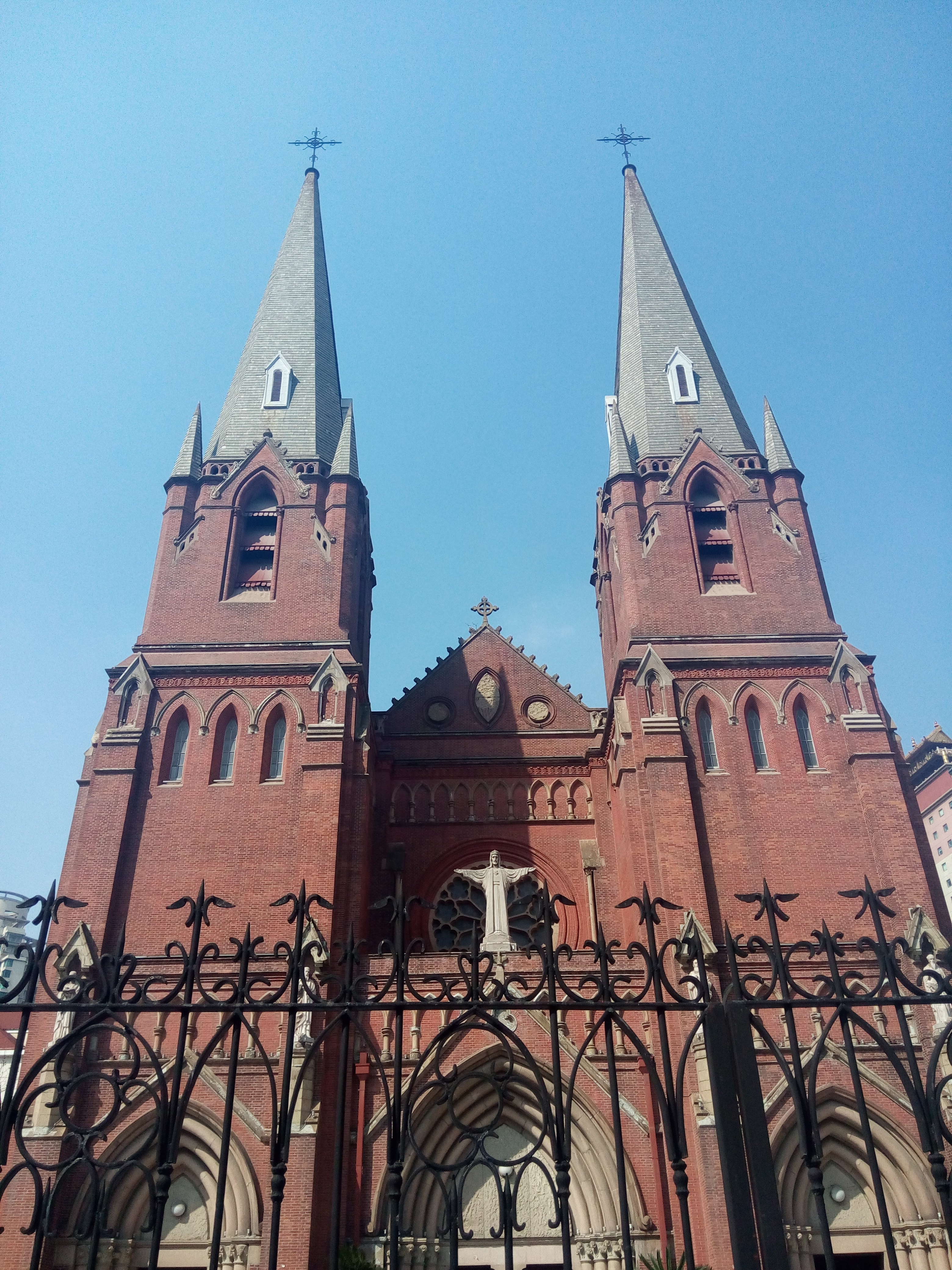 徐家汇圣依纳爵主教座堂